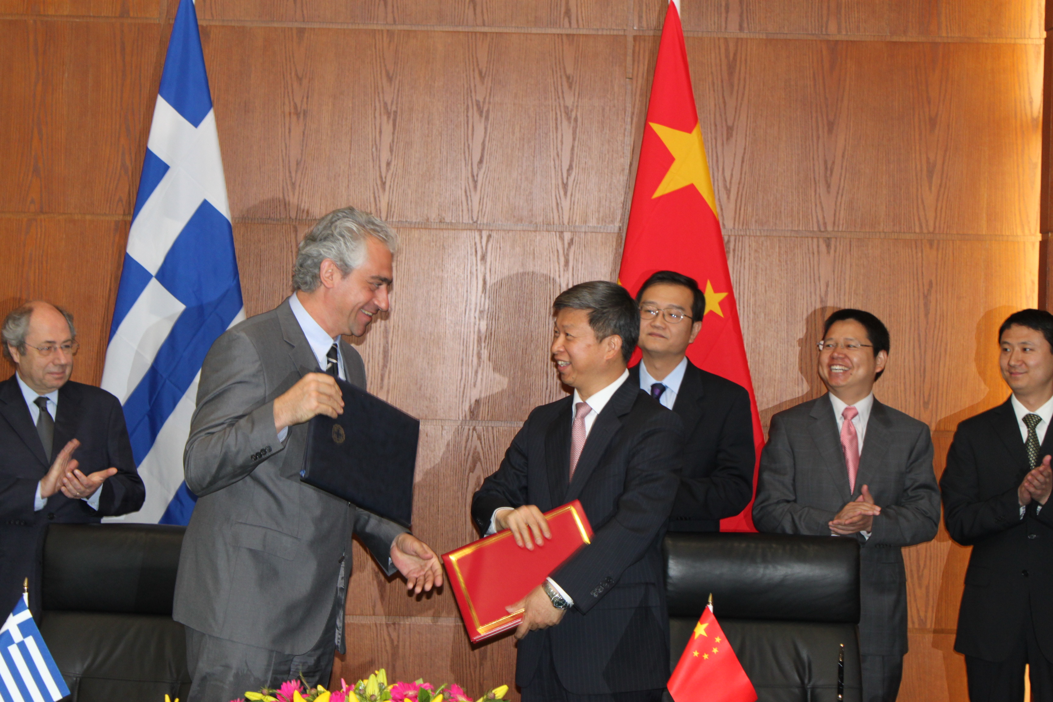 Ο ΥΦΥΠΕΞ, κ. Κουβέλης και ο ομόλογός του ΥΦΥΠΕΞ, κ. Song Tao στην υπογραφή της κοινής συμφωνίας για τις διευκολύνσεις εισόδου για Έλληνες και Κινέζους πολίτες Deputy FM Kouvelis visiting Beijing (15-17 May 2011)